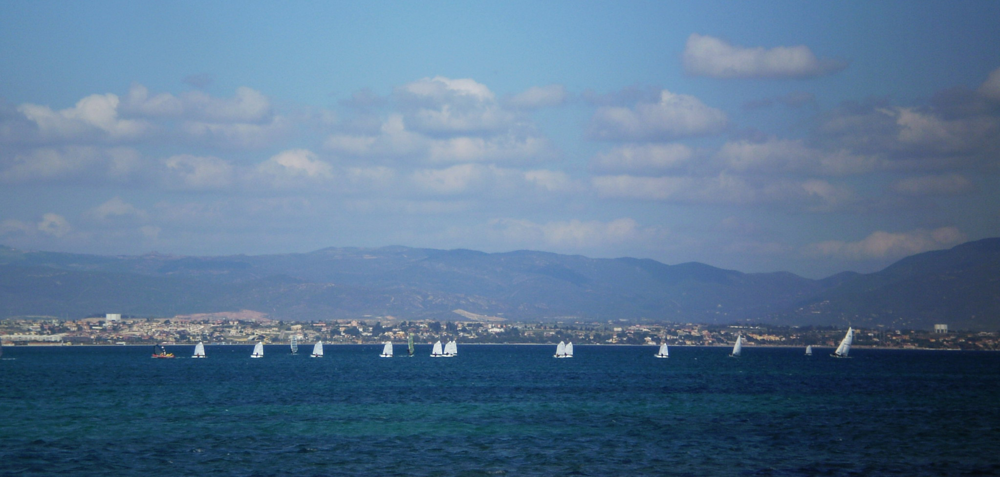 Costa degli Angeli - Sardegna